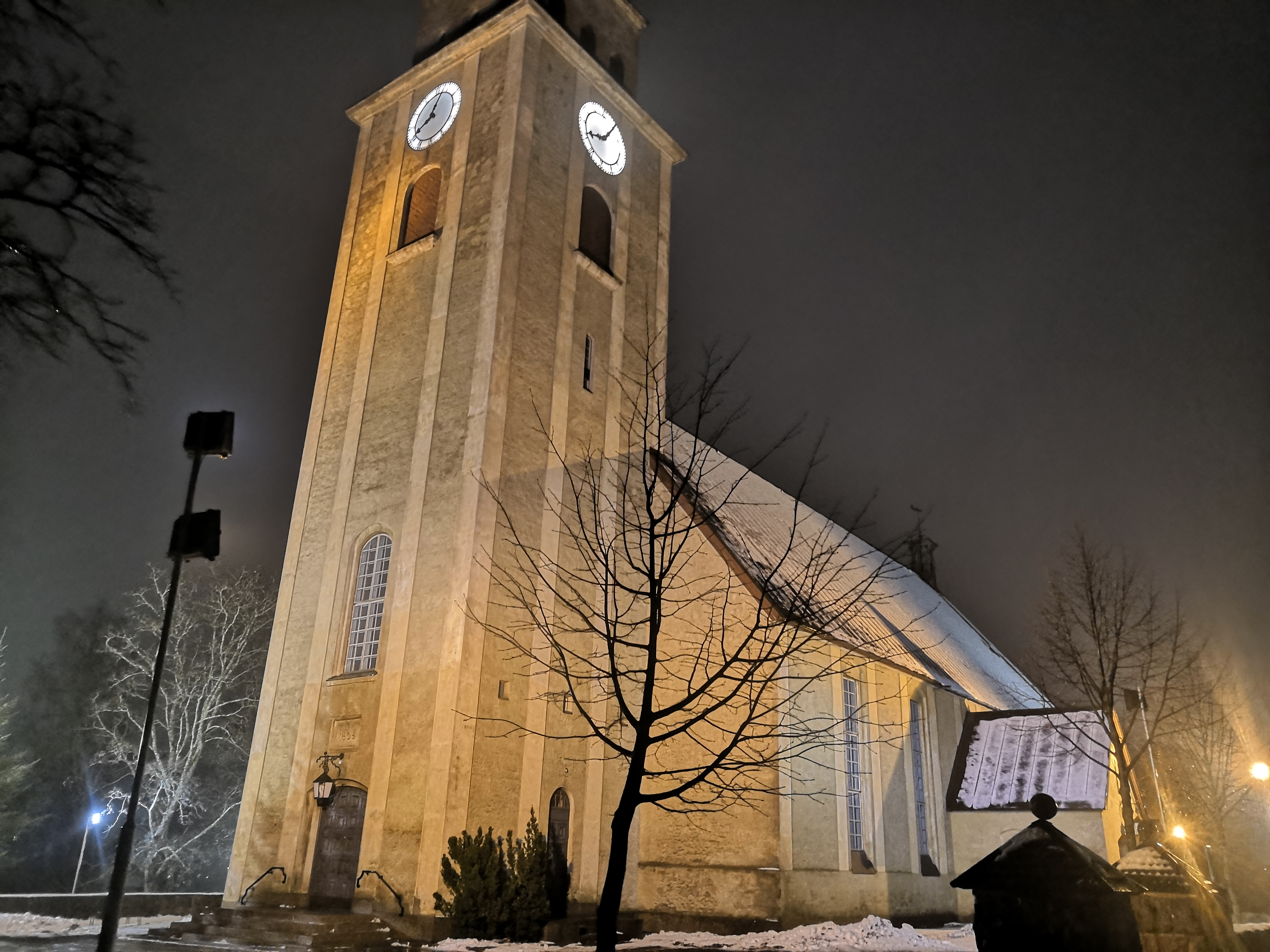 Kuusankosken kirkko iltavalaistuksessa